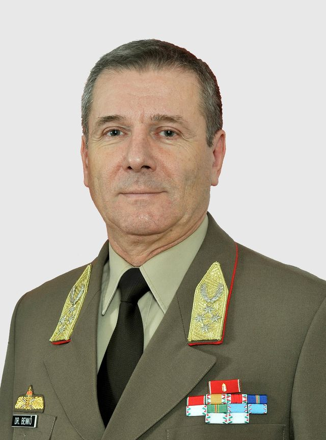 Benkő Tibor vezérezredes, MH Honvéd Vezérkar főnök (2010-től).